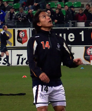 Match de Foot Rennes - Lorient, 23 Février 2008, Ligue 1 Saison 2007-2008